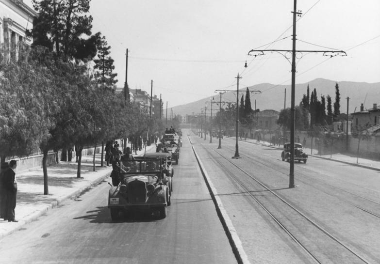 Einmarsch der Aufklärungsabteilung in Athen Aufkl.Abt..d.5.Pz.Div. ST.P 149/36 Information added by Wikimedia users.Possible location is Vasilissis Sophias Avenue, Athens.